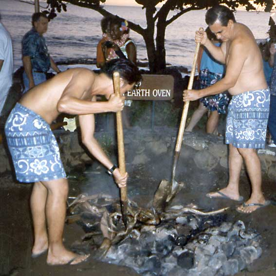 Erdofen (Imu), in dem meist Kaluaa-Schwein zubereitet wird